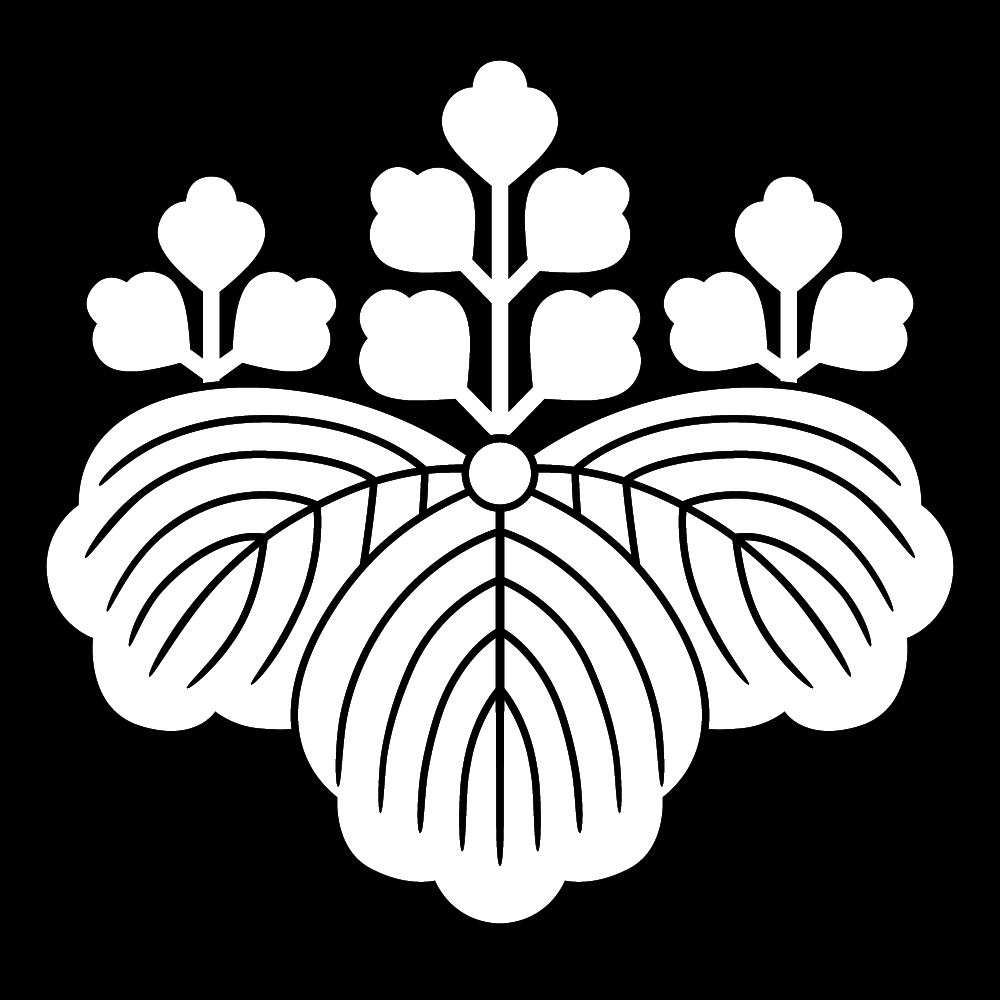 家紋「桐」の一種。五三桐紋。